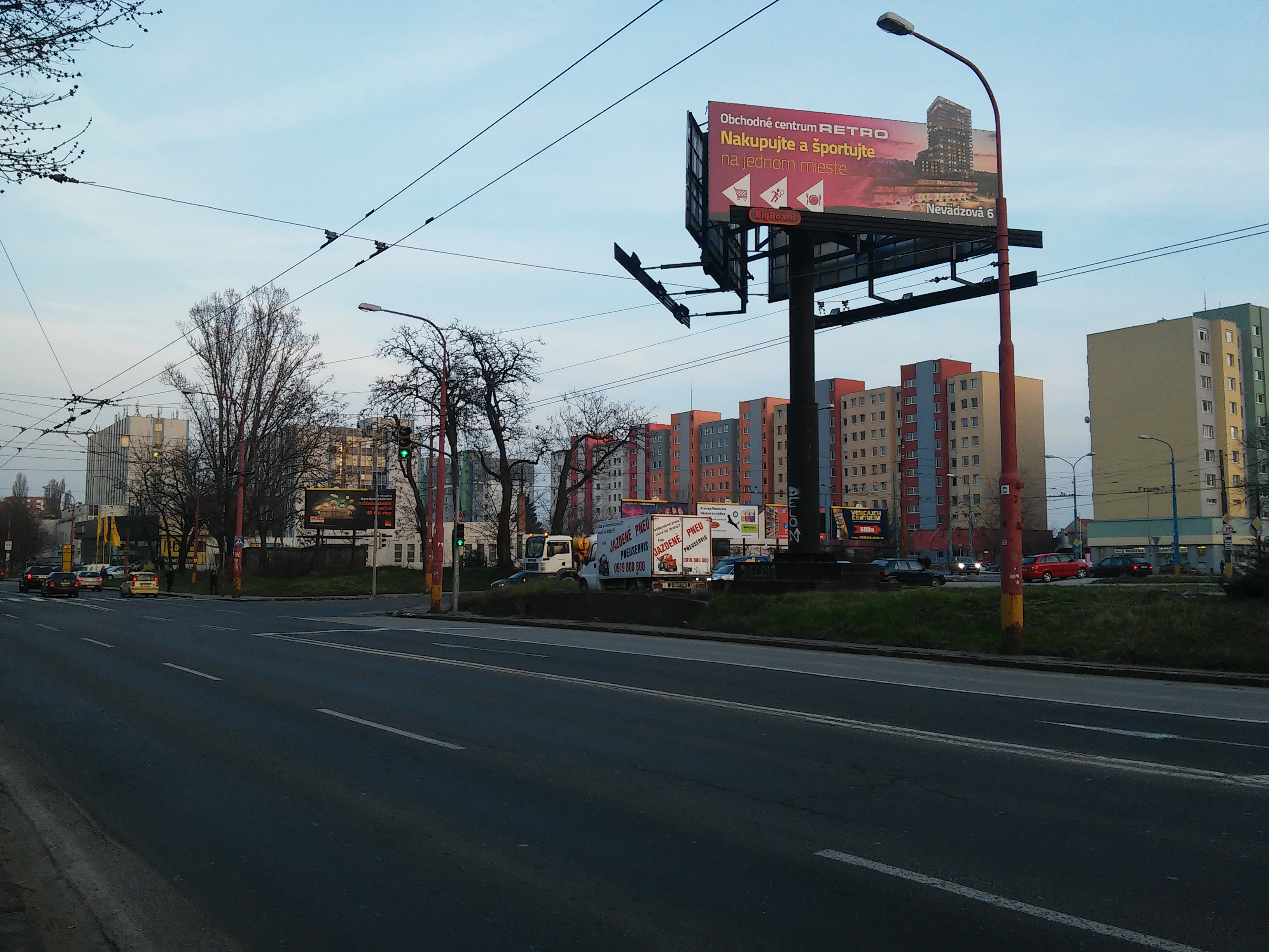 Gagarinova ulica, Bratislava - Ružinov